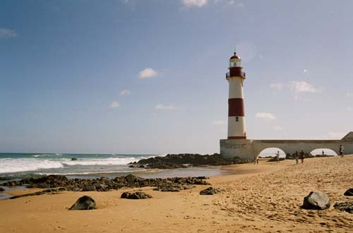 Ponta de Itapuã Lighthouse, Salvador, Bahia, Brazil